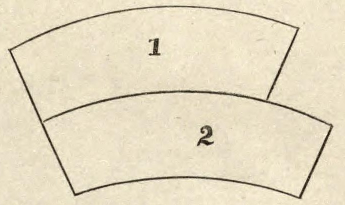 Dois segmentos de arco de forma e tamanho semelhantes, dispostos um acima do outro e de modo a que os limites esquerdos de cada um estejam alinhados, provocando a ilusão que o segmento inferior é maior.